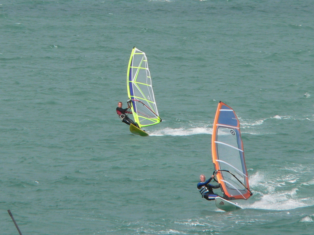 Funboard à Belle Ile (56)